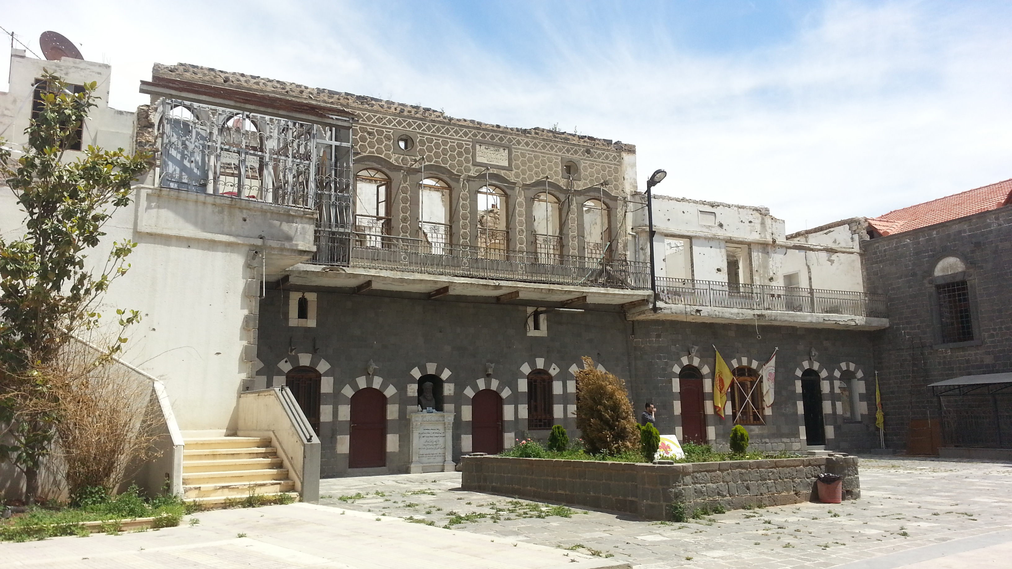 حمص القديمة